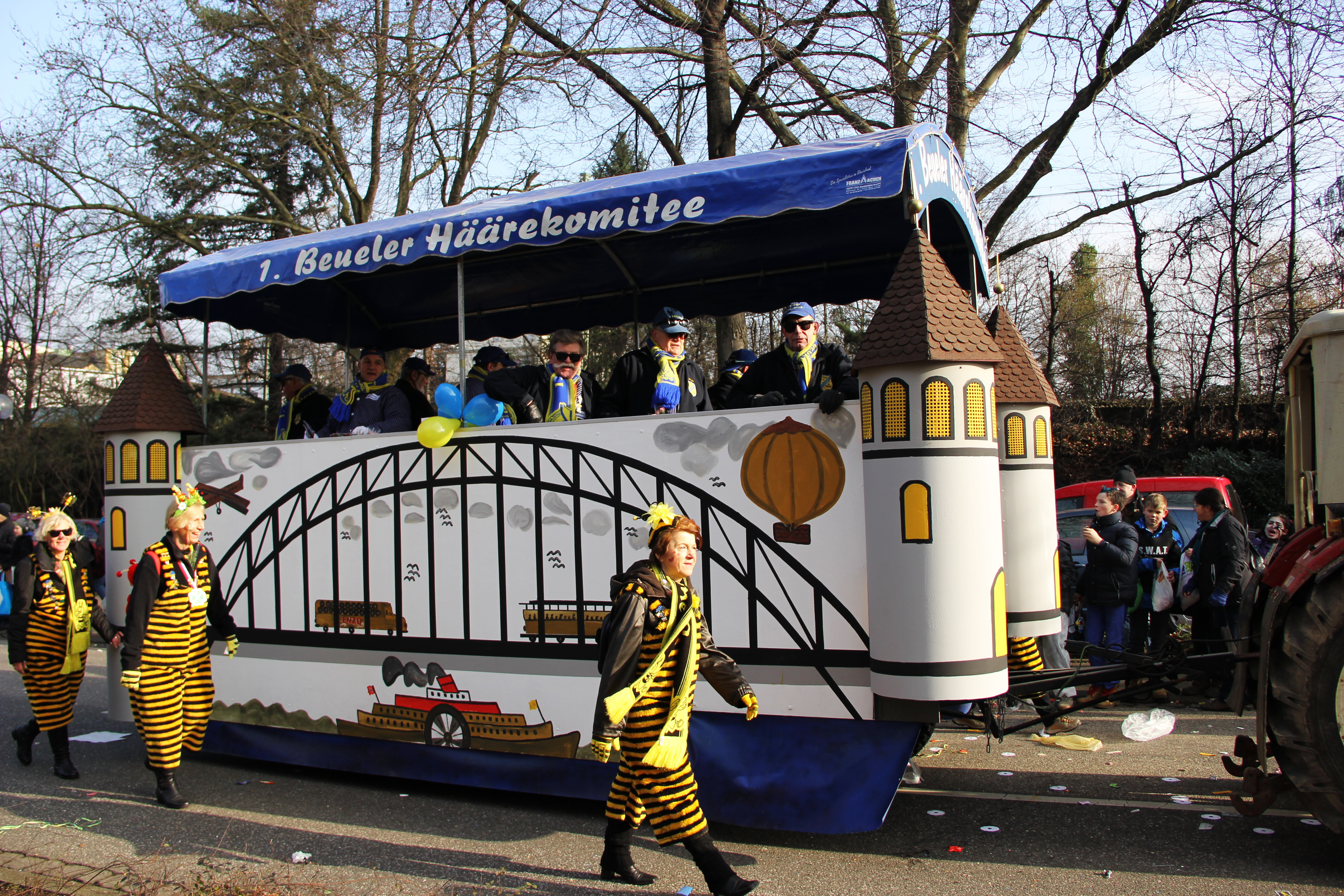 Dr' Zoch kütt! - Wieverfastelovend in Beuel